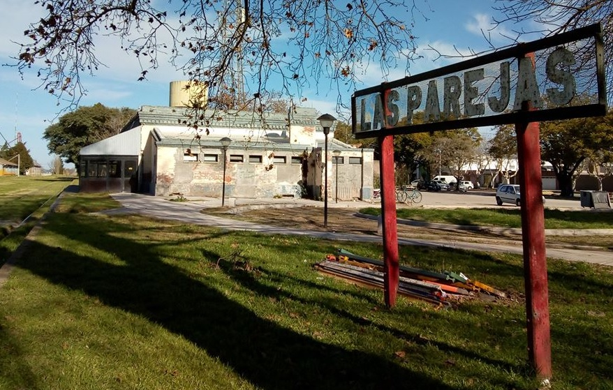 Cartel nomenclador y estación Las Parejas